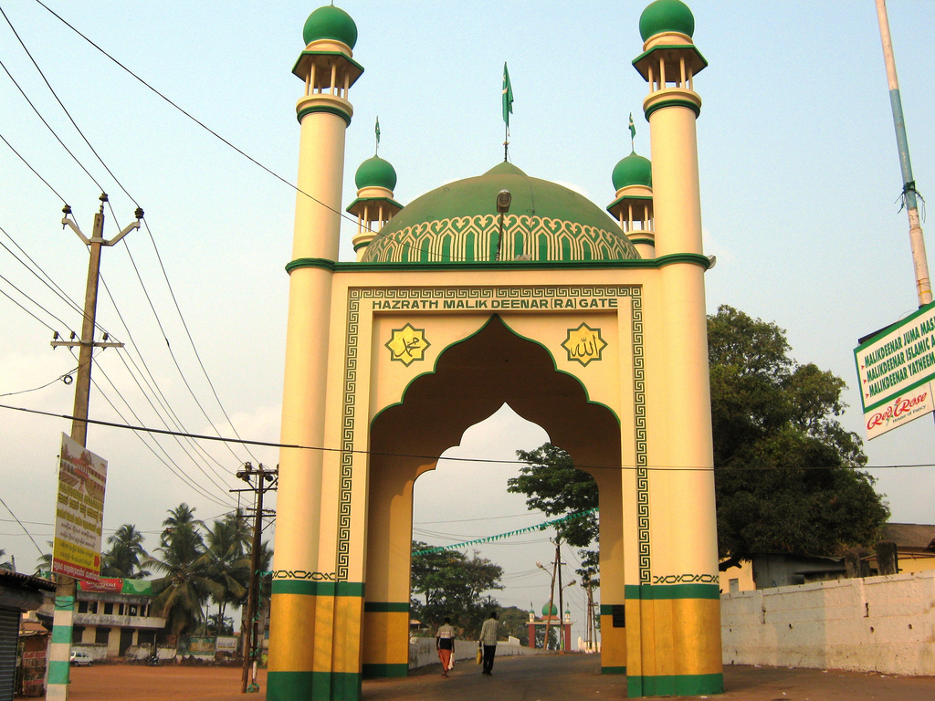 Kasaragod, India